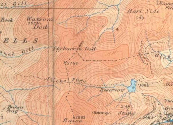 old OS map